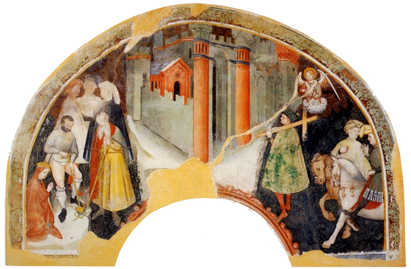 Fresque Il ritrovamento e l'esaltazione della croce, Museo Diocesano Albani, Urbino